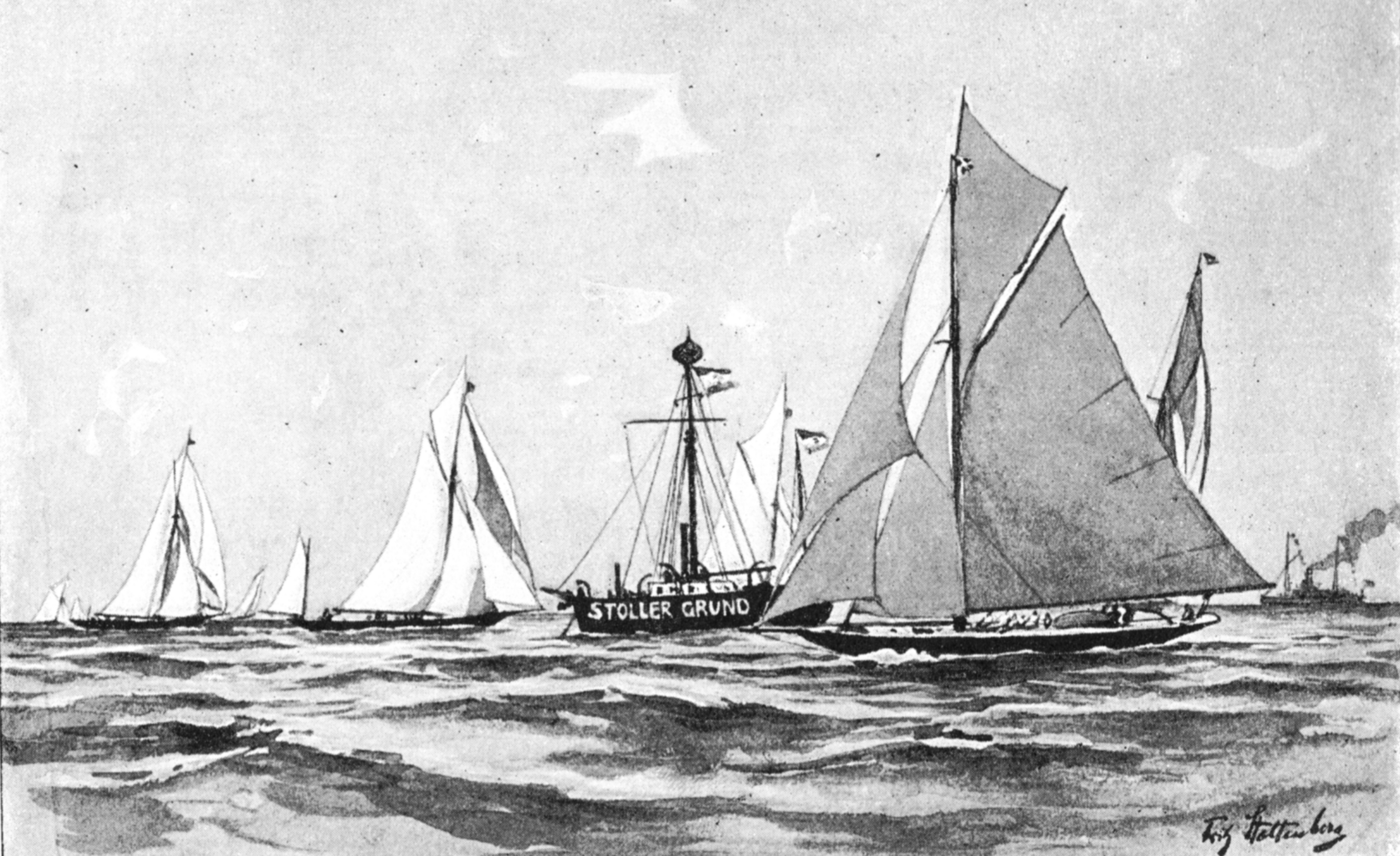 Impressionen von der Kieler Woche von Fritz Stoltenberg.